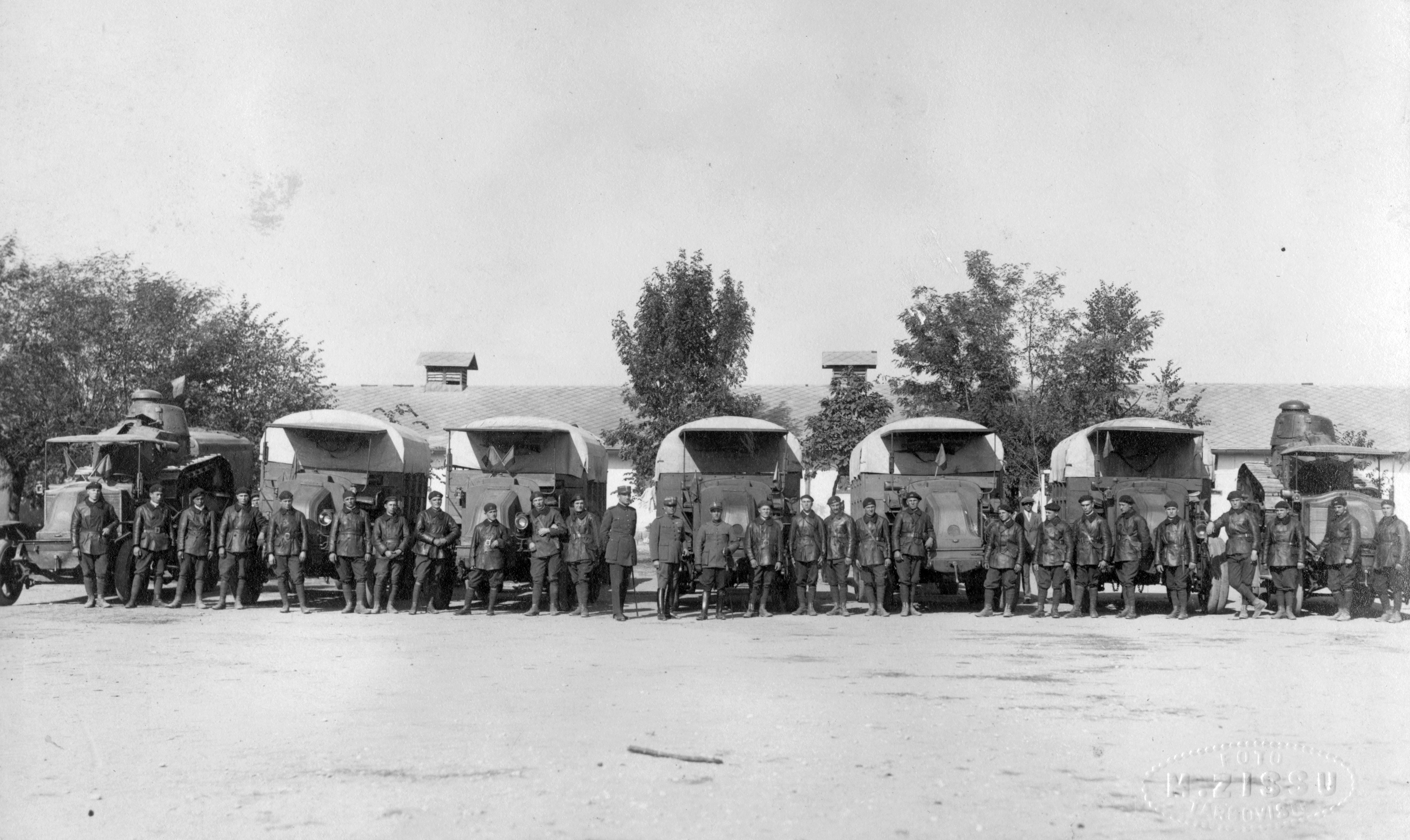 Francia gyártmányú Latil TAR tüzérségi vontatók és Renault FU típusú teherautók. Tags: tow truck, commercial vehicle, Renault-brand Title: Francia gyártmányú Latil TAR tüzérségi vontatók és Renault FU típusú teherautók.